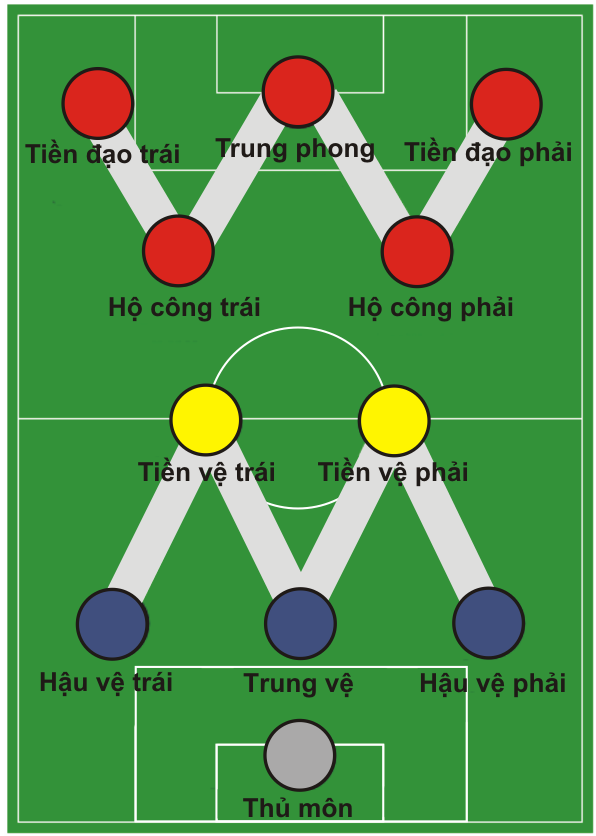 Phiên bản tiếng Việt này được dịch từ một phiên bản ngôn ngữ khác trên Wikipedia